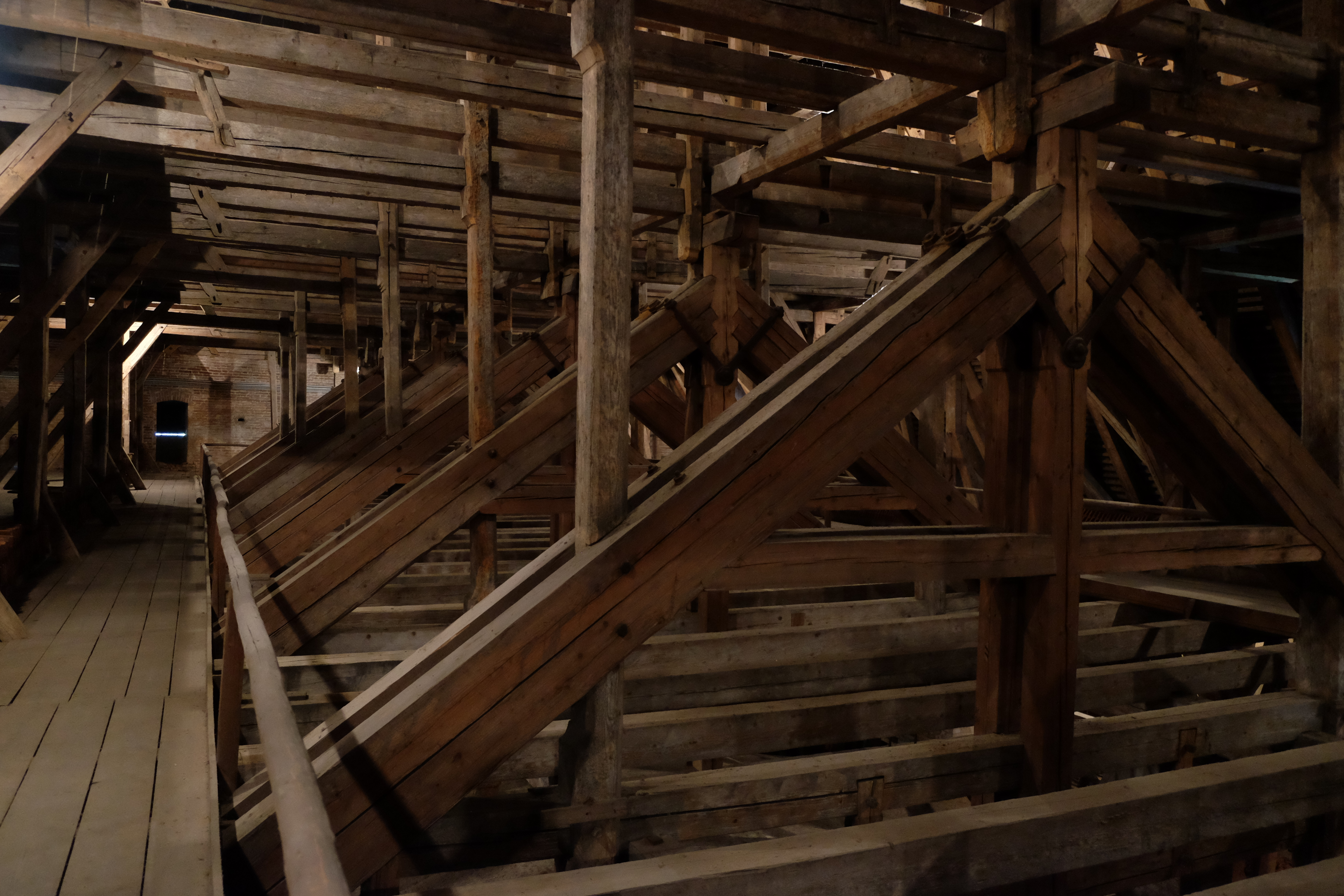 Dachstuhl des Münsters 3